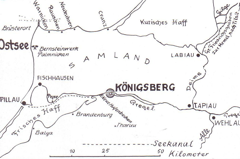 schematic drawing of the Königsberger Seekanal